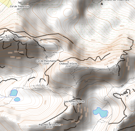 carte réalisée sur umap This map may be incomplete, and may contain errors. Don't rely solely on it for navigation.